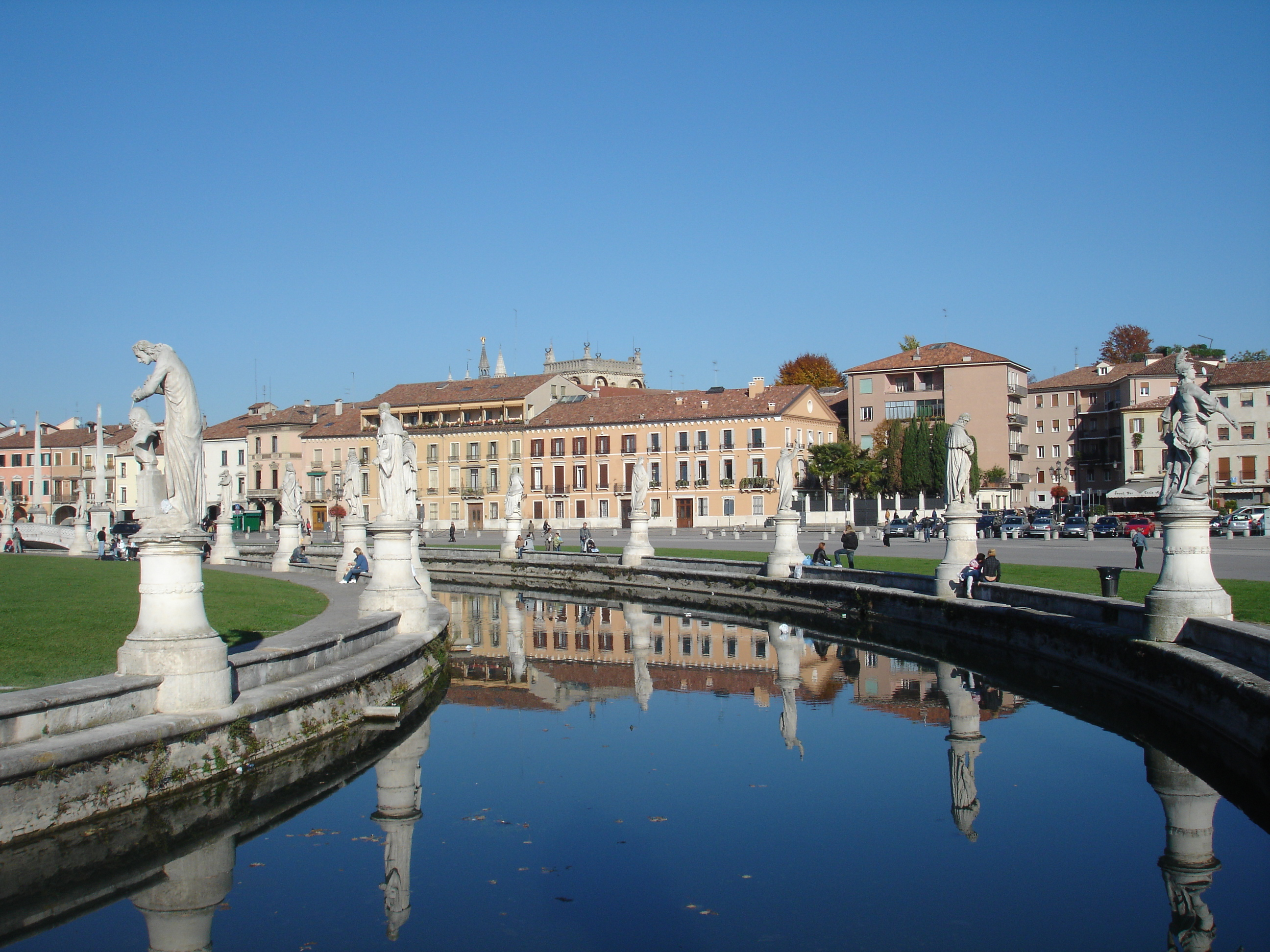 Dettaglio di Prato della Valle a Padova